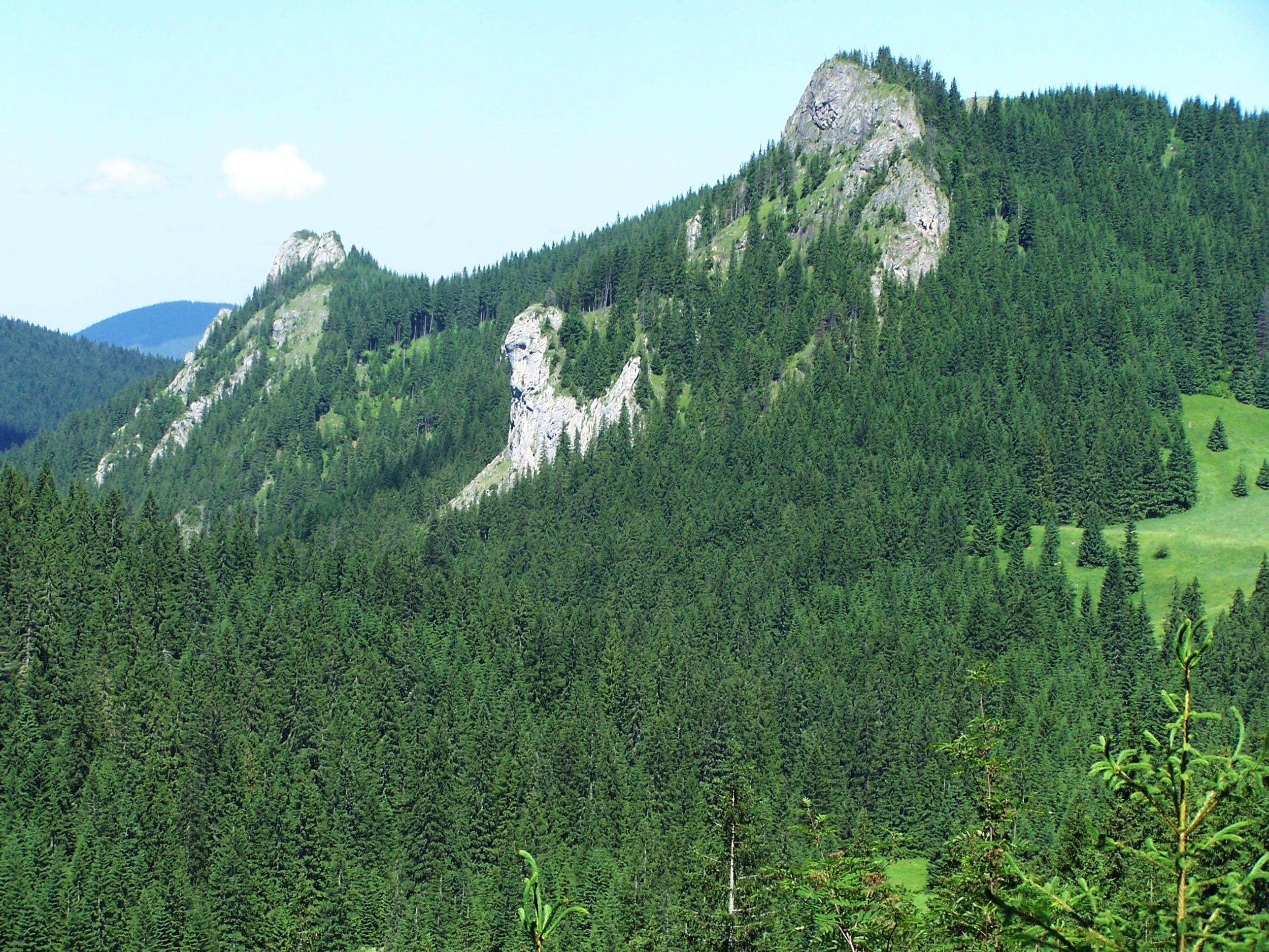 Dolina Miętusia - Kończysta Turnia, Zawiesista Turnia